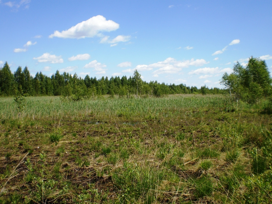 Laukagalio pelkė, Kėdainių raj.